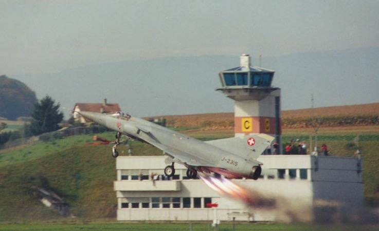 Mirage3S macht einen Jato Start vor dem Tower in Payerne. (Besuchstag der RS 1996) Décollage d'un Mirage IIIS (J-2315) avec fusée d'appoint JATO à Payerne, Suisse, (jounée des parents d'un école de recrue en 1996). Ce système permettait d'effectuer un décollage sur une courte distance, notamment en cas de piste endommagée.